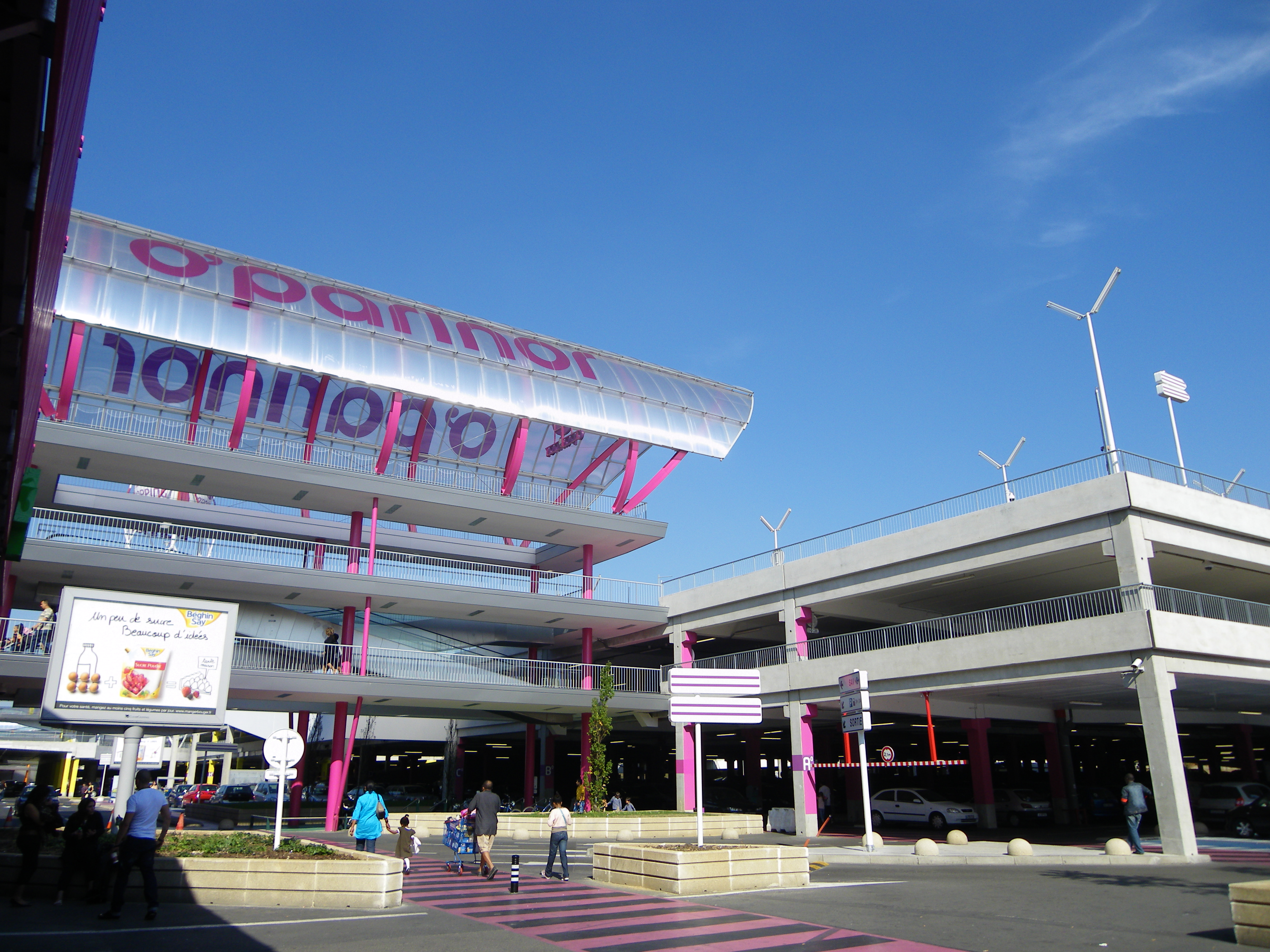 O'Parinor.